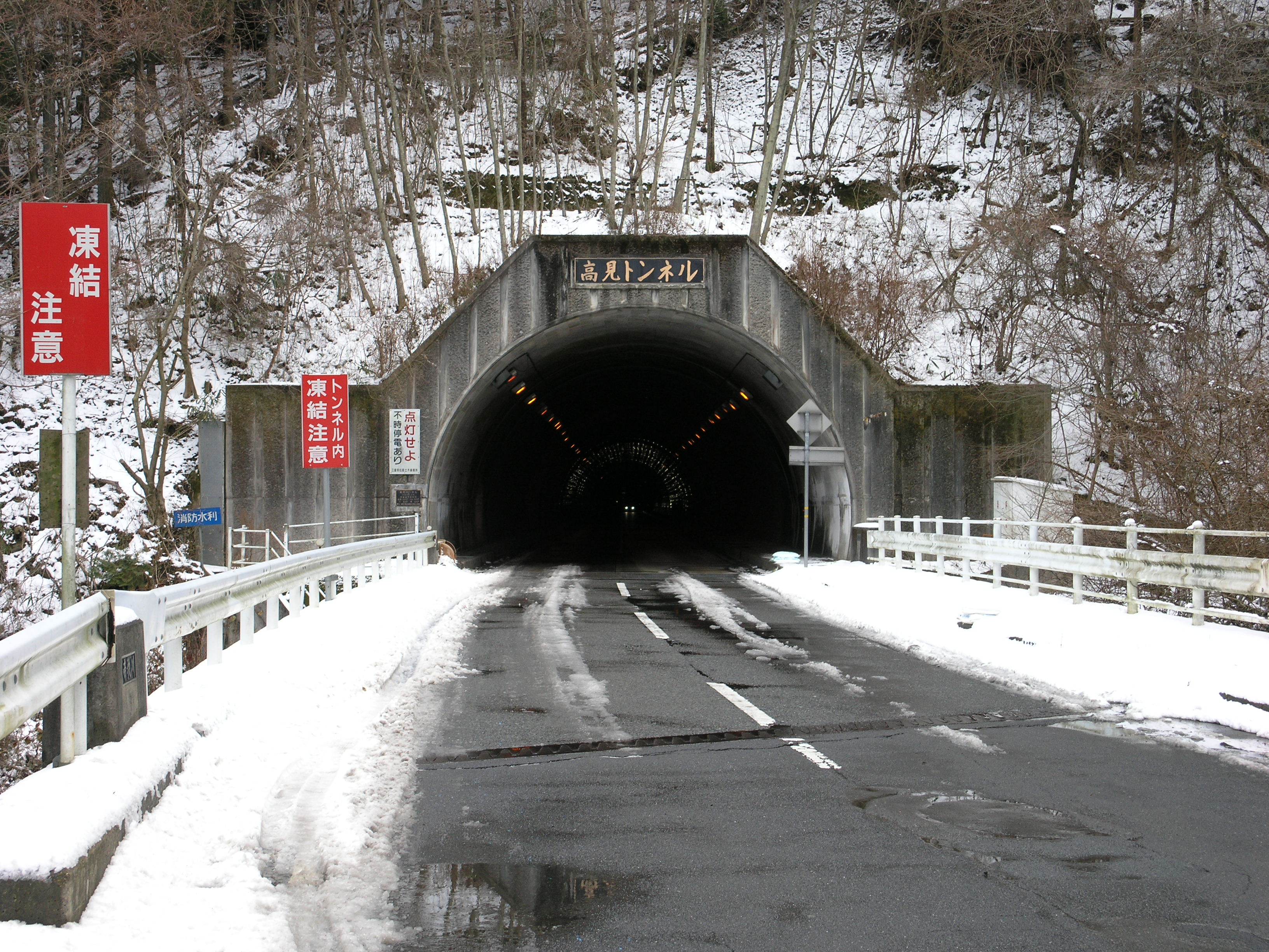 Takami-Tunnel in Nara, Japan